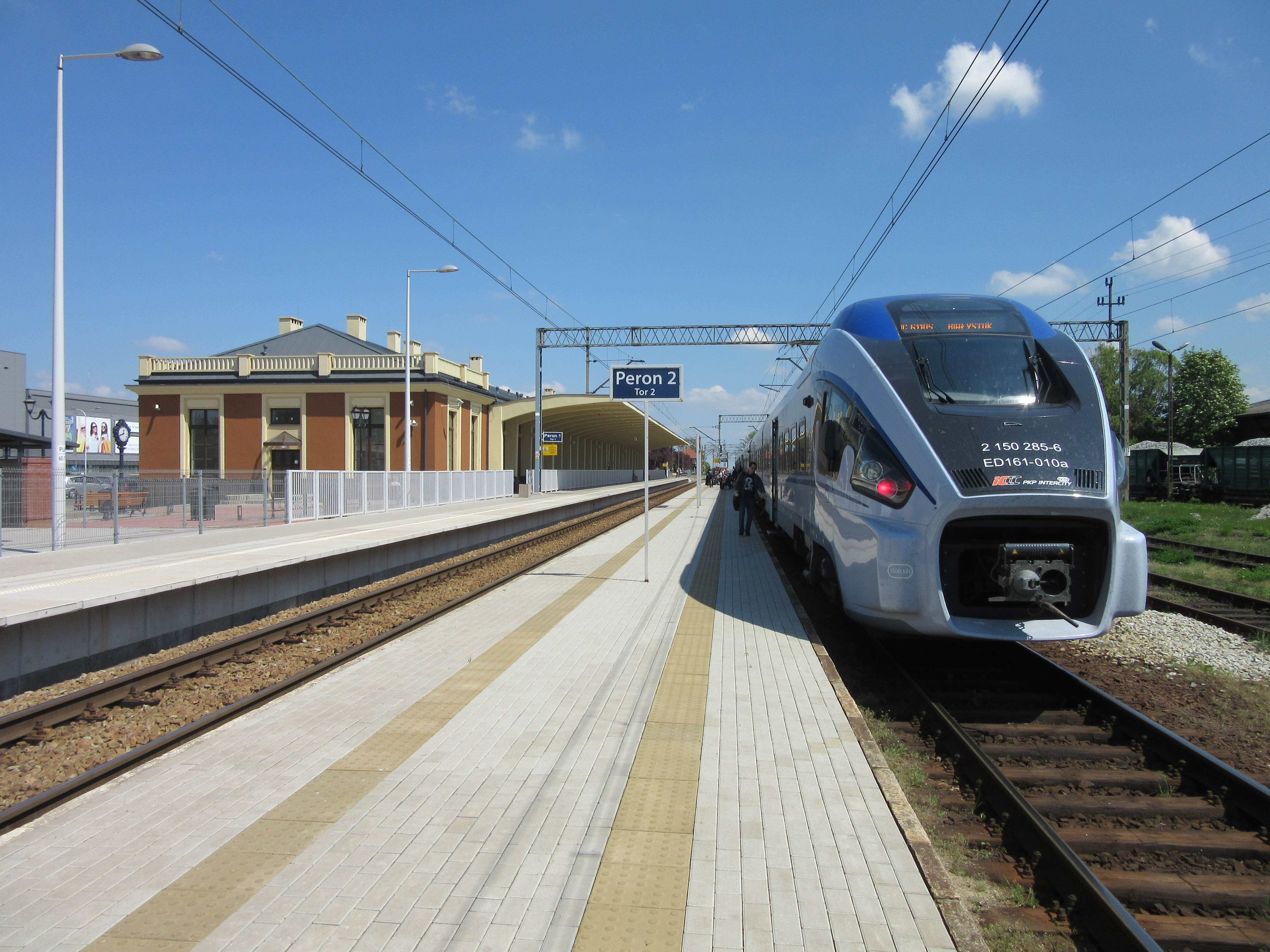 ED161-010 (Pesa Dart) na stacji kolejowej w Kaliszu